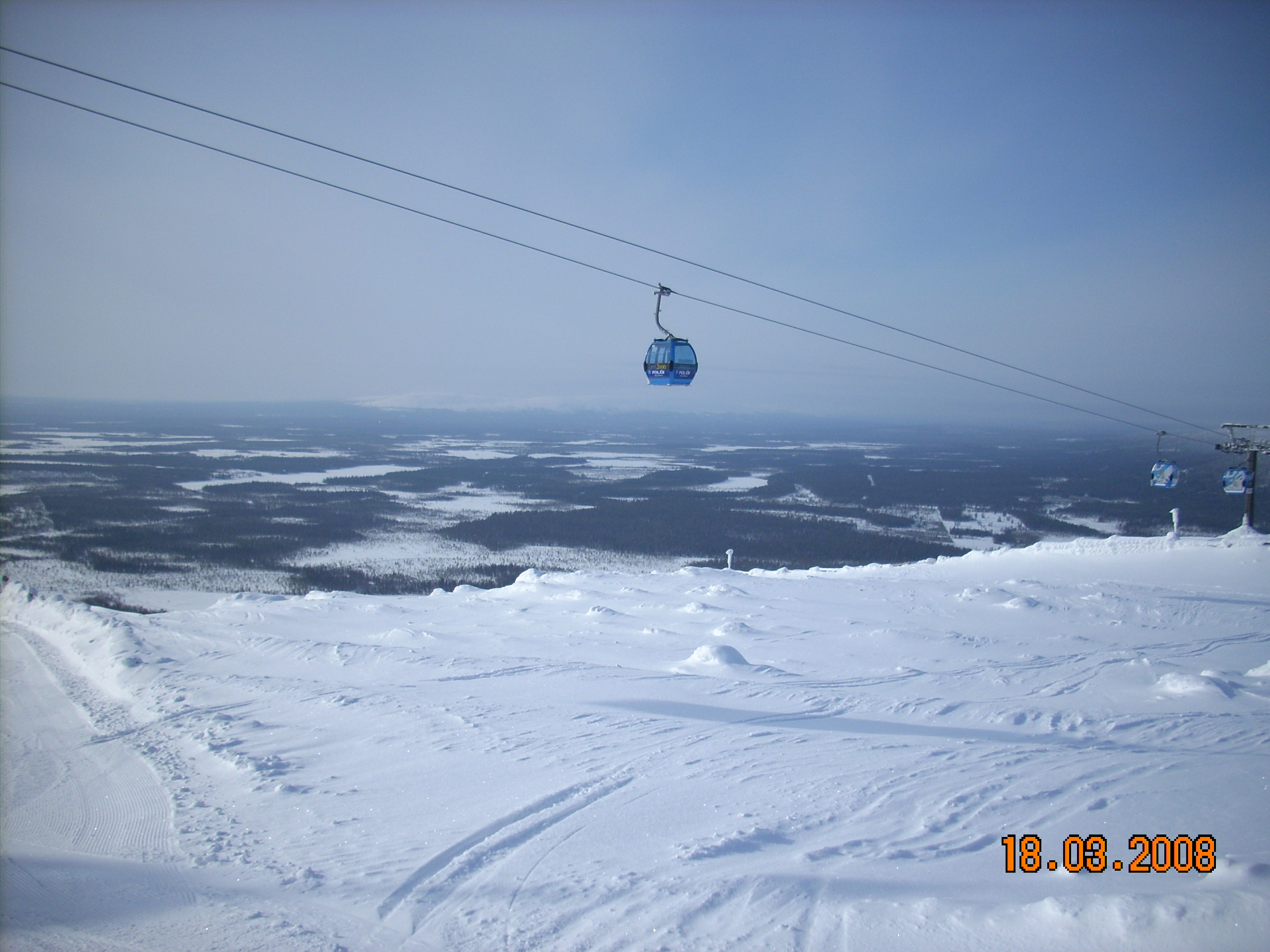 Kuva Levin gondolihissistä.